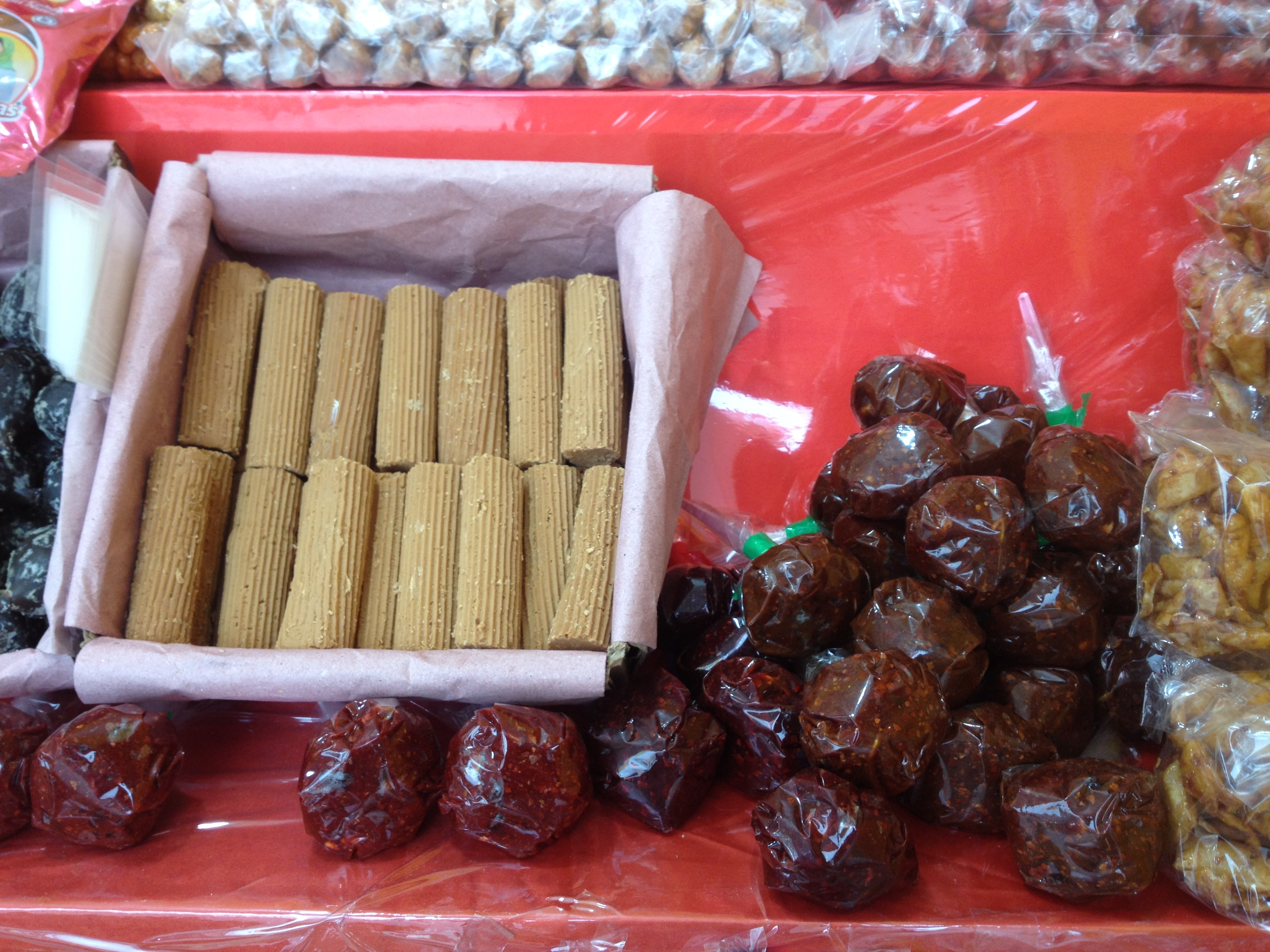 Dulces de leche típicos del estado de Oaxaca, México presentados en la feria Guelaguetza 2014